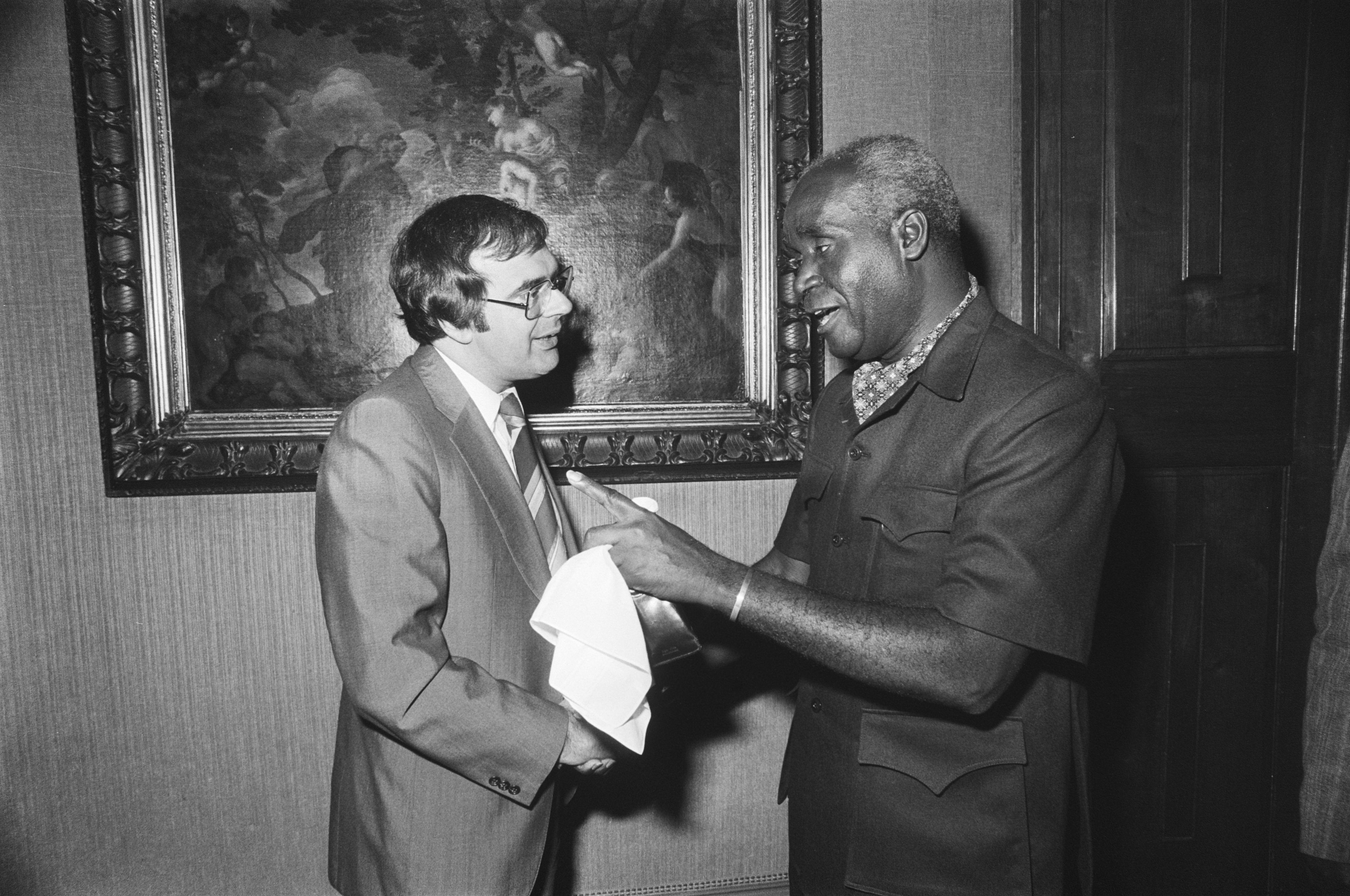 Collectie / Archief : Fotocollectie Anefo Reportage / Serie : [ onbekend ] Beschrijving : President Kaunda van Zambia bij minister Pronk Datum : 14 juni 1977 Locatie : Zambia Trefwoorden : ministers, presidenten Persoonsnaam : Kaunda, Kenneth, Pronk, Jan Fotograaf : Suyk, Koen / Anefo Auteursrechthebbende : Nationaal Archief Materiaalsoort : Negatief (zwart/wit) Nummer archiefinventaris : bekijk toegang 2.24.01.05 Bestanddeelnummer : 929-2289